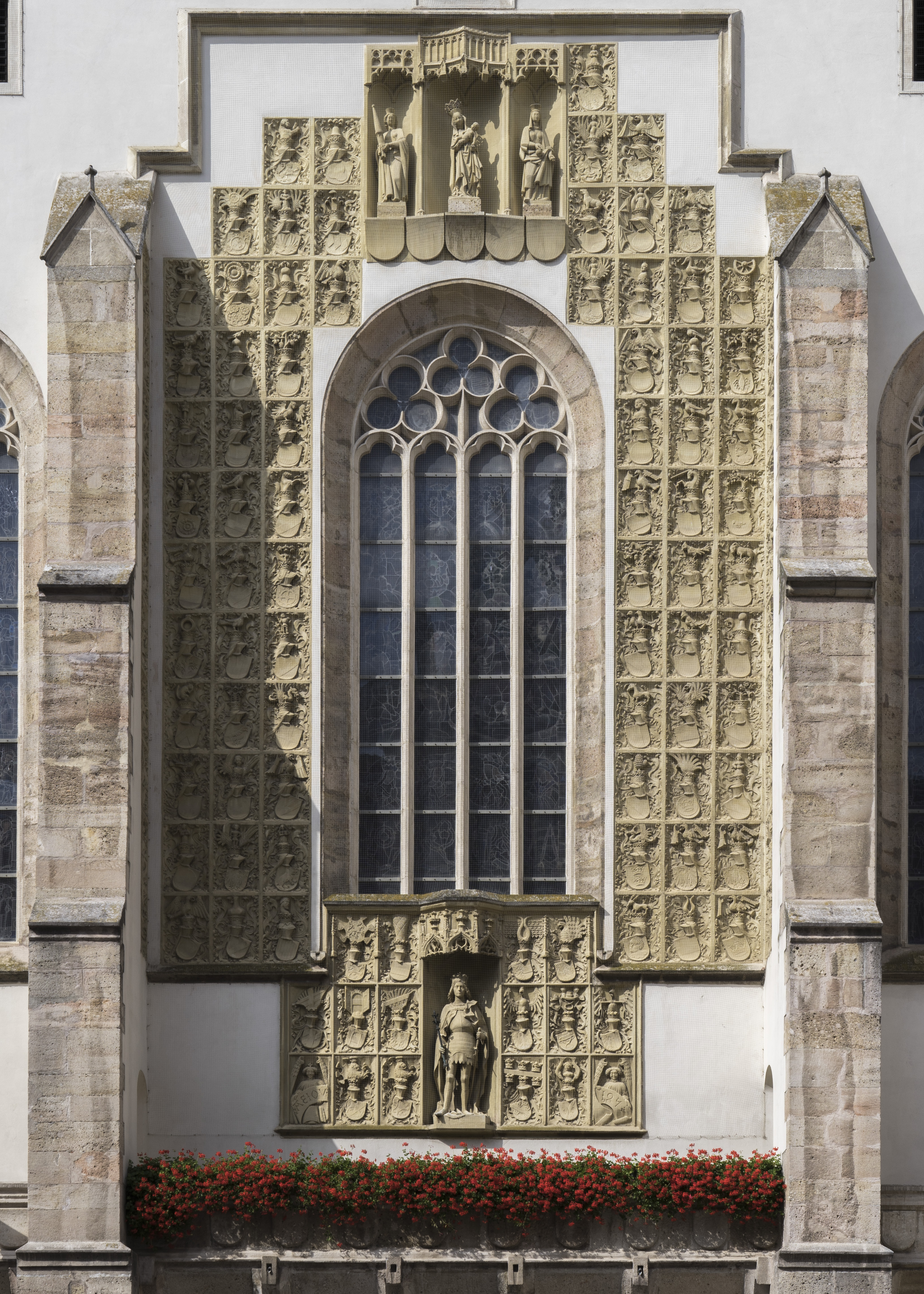 Wiener Neustadt – Theresianische Militärakademie. Wappenwand Dieses Bild wurde anlässlich des österreichischen Tags des Denkmals 2017 in Niederösterreich eingereicht. Diese Datei wurde im Rahmen von WikiDaheim 2017 in Österreich erstellt und hochgeladen.Sie wurde dem Themenbereich Denkmalschutz zugeordnet.